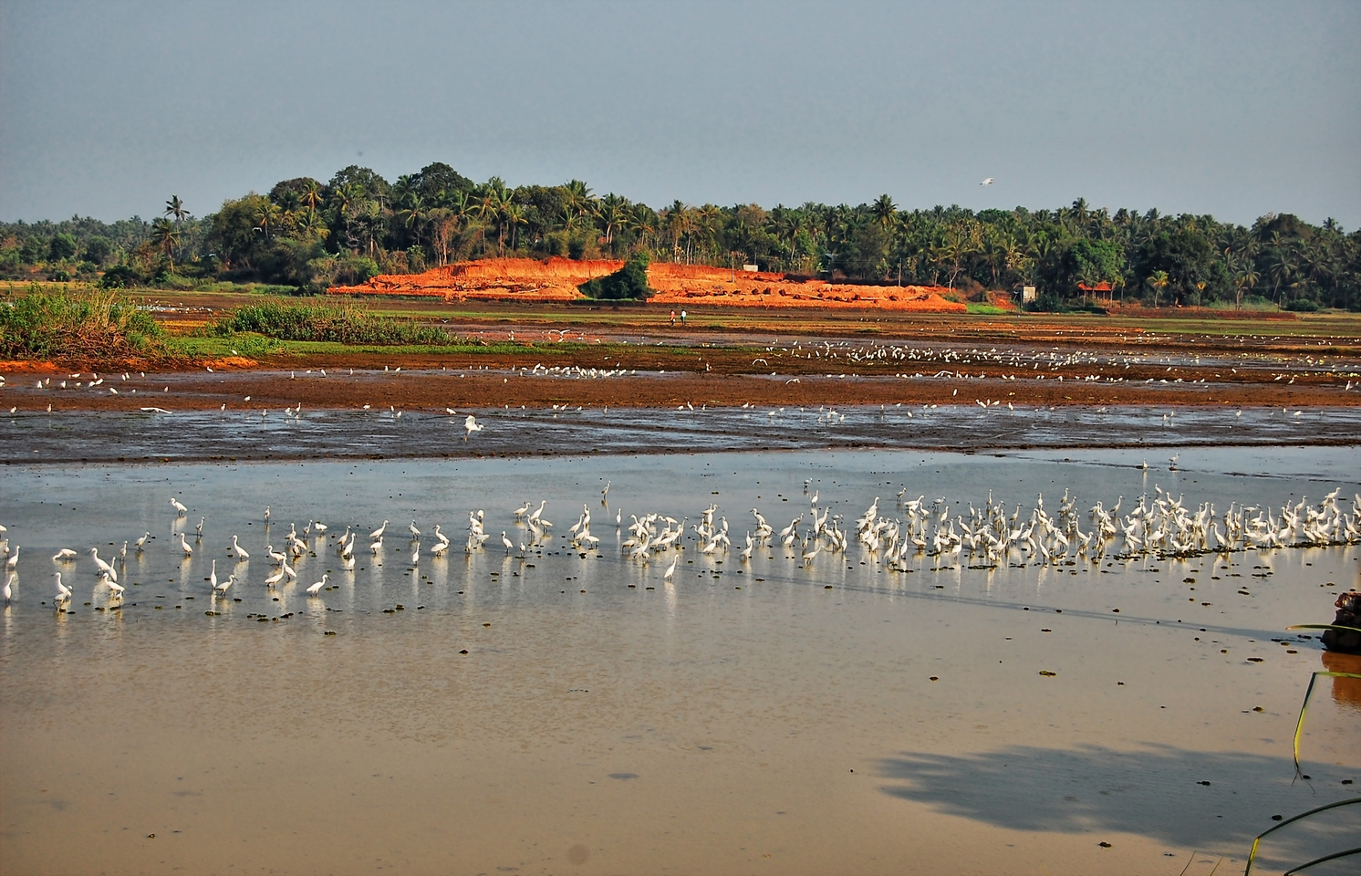 തൃശൂരിലെ തൊമ്മാനയിലെ കോൾനിലങ്ങൾ- ദേശാടനക്കിളികളേയും കാണാം